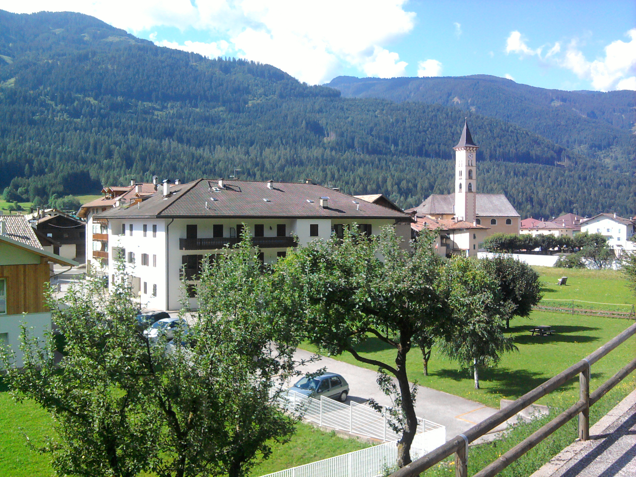 Veduta di Ziano dalla frazione di Zanon